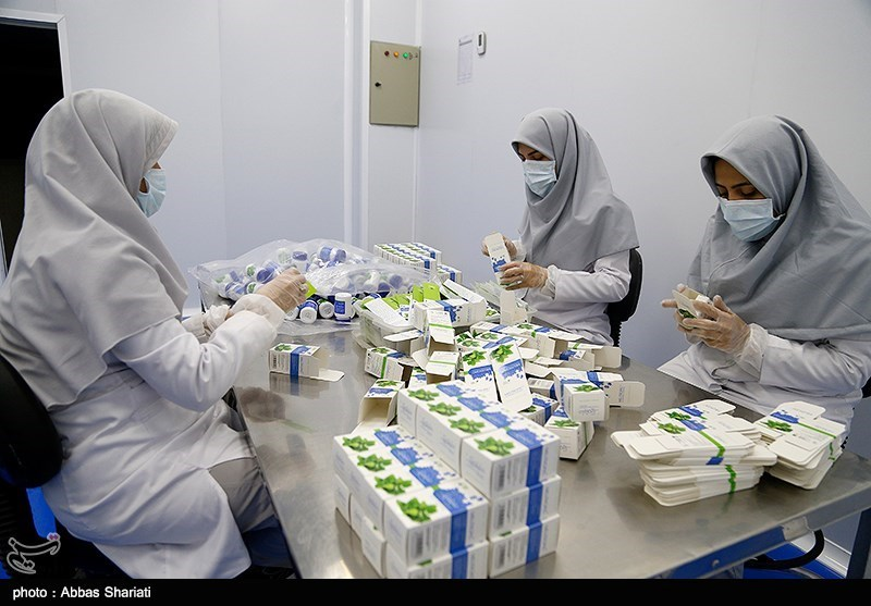 افتتاح خط تولید داروی گیاهی درمان الزایمر - البرز